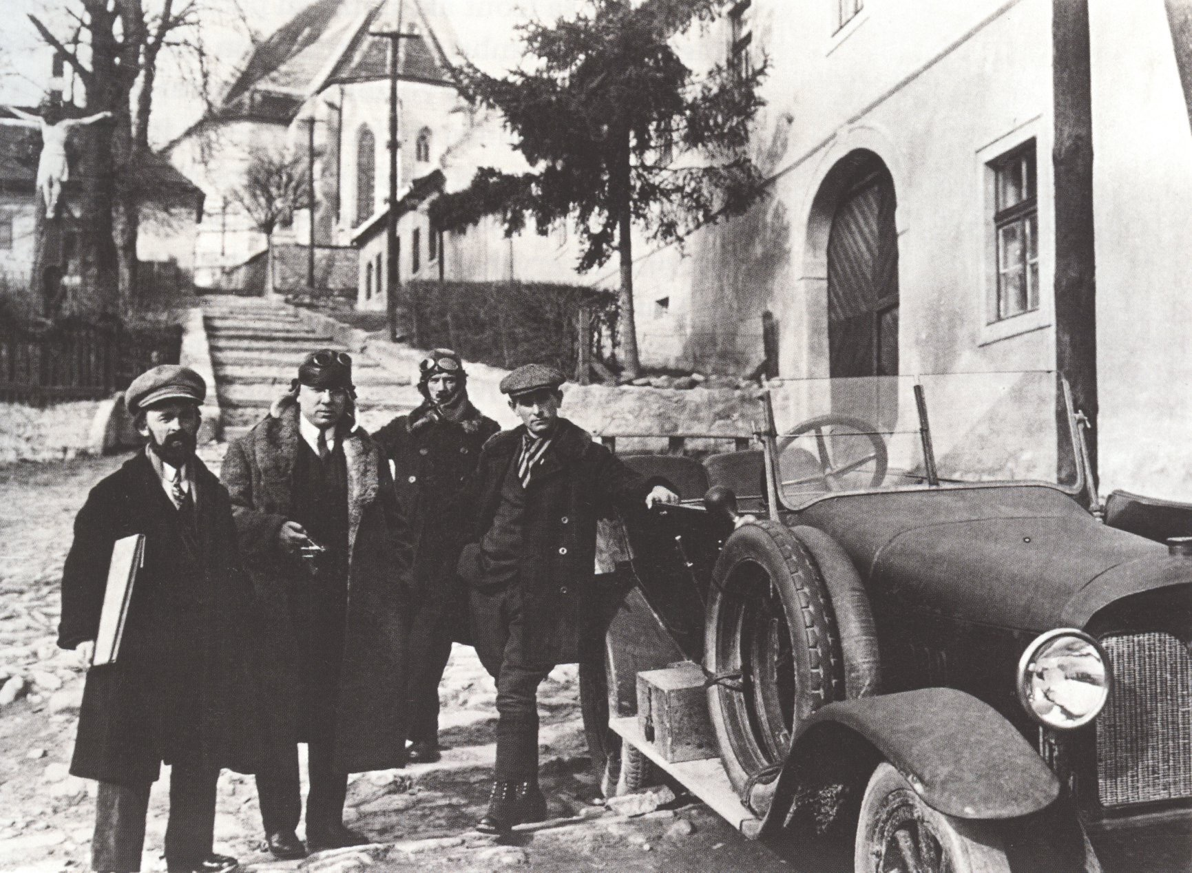 v.l.n.r. Karl Frech, Dr. Ovidius Faust, Museumsfotograf Josef Hofer, junger Mann (unbekannt)